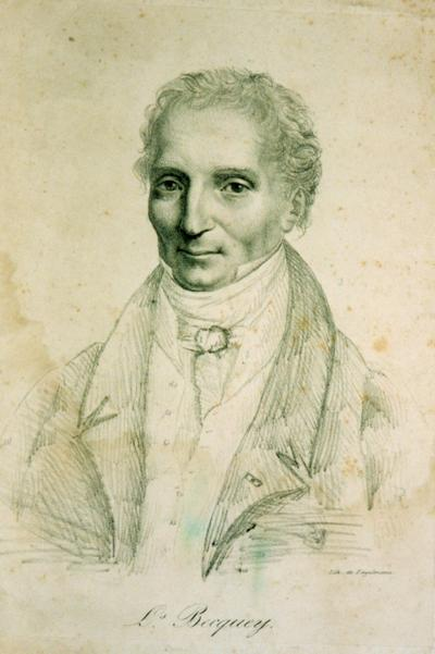 portrait de Louis Becquey.